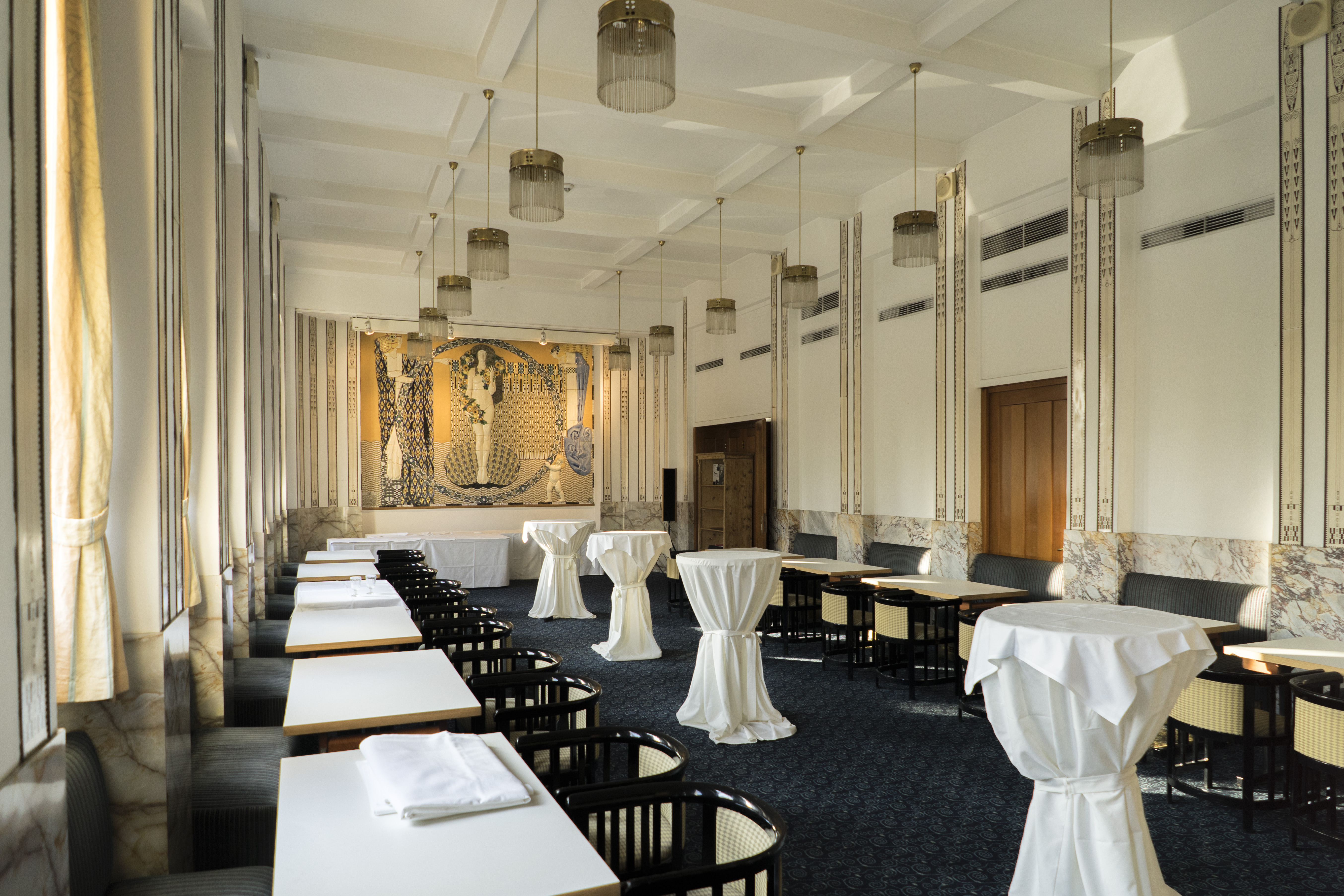 Jugendstilmosaik Hotel Wiesler, Graz 1 Leopold Forstner